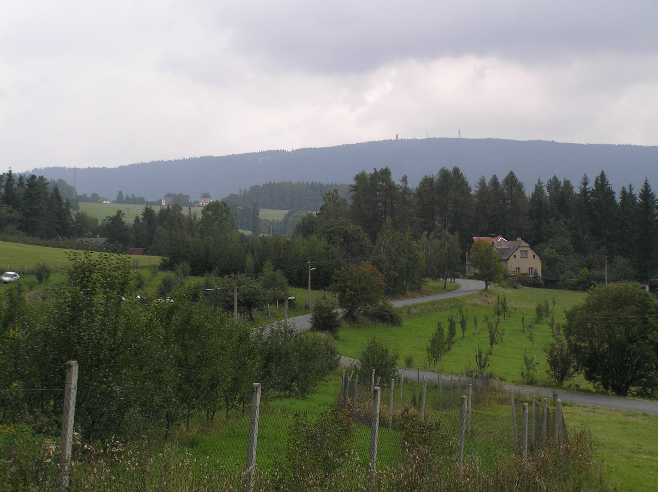 Alšovice - pohled od Dupandy k severu do okolí domů če. 119 a čp. 175